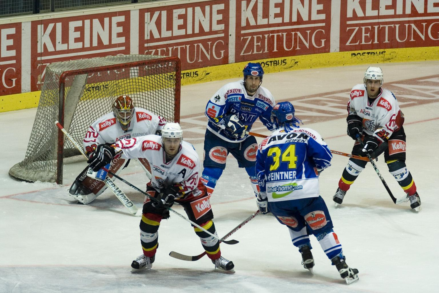 Spieler des HK Jesenice im Spiel gegen den EC VSV. Sonstiges: Zustimmung zur Veröffentlichung unter CC BY SA wurde per Mail erteilt. --Zaxxon 19:47, 1. Nov. 2006 (CET)